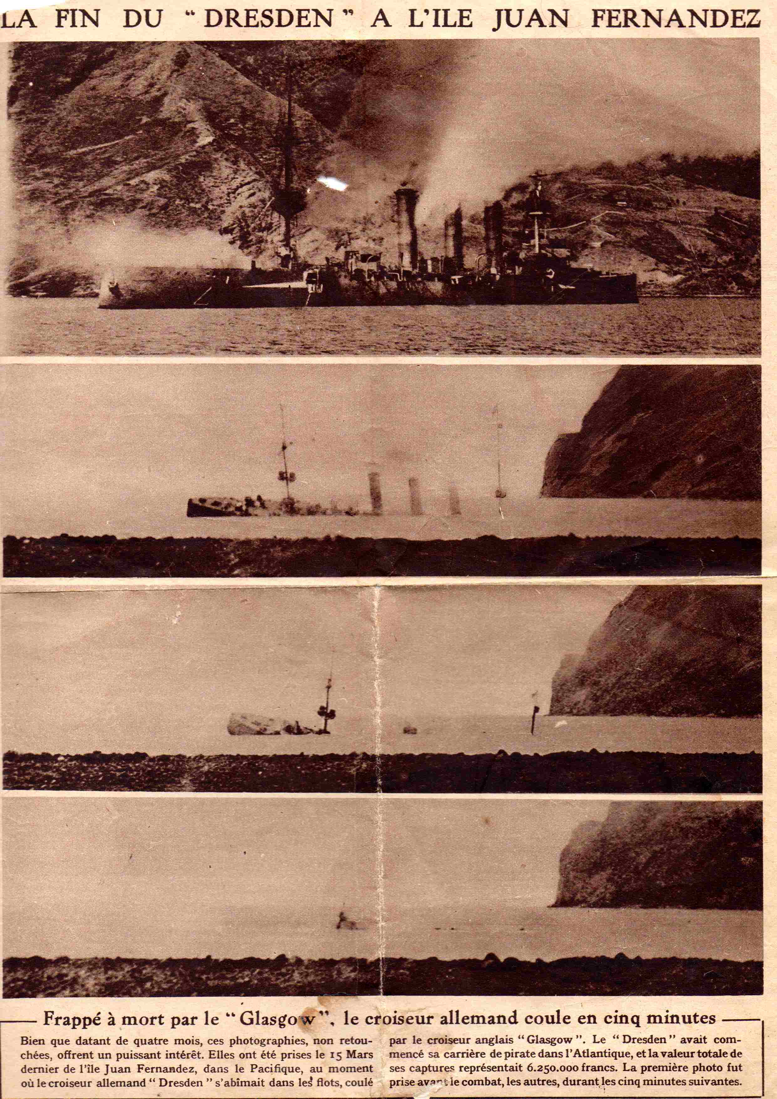 Article de presse des années de guerre